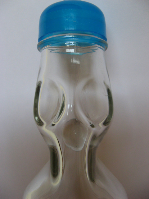 Foto do gargalo de uma garrafa de Ramune. A bolinha de vidro e as saliências dão o aspecto de um rosto alienígena ou de um palhaço.